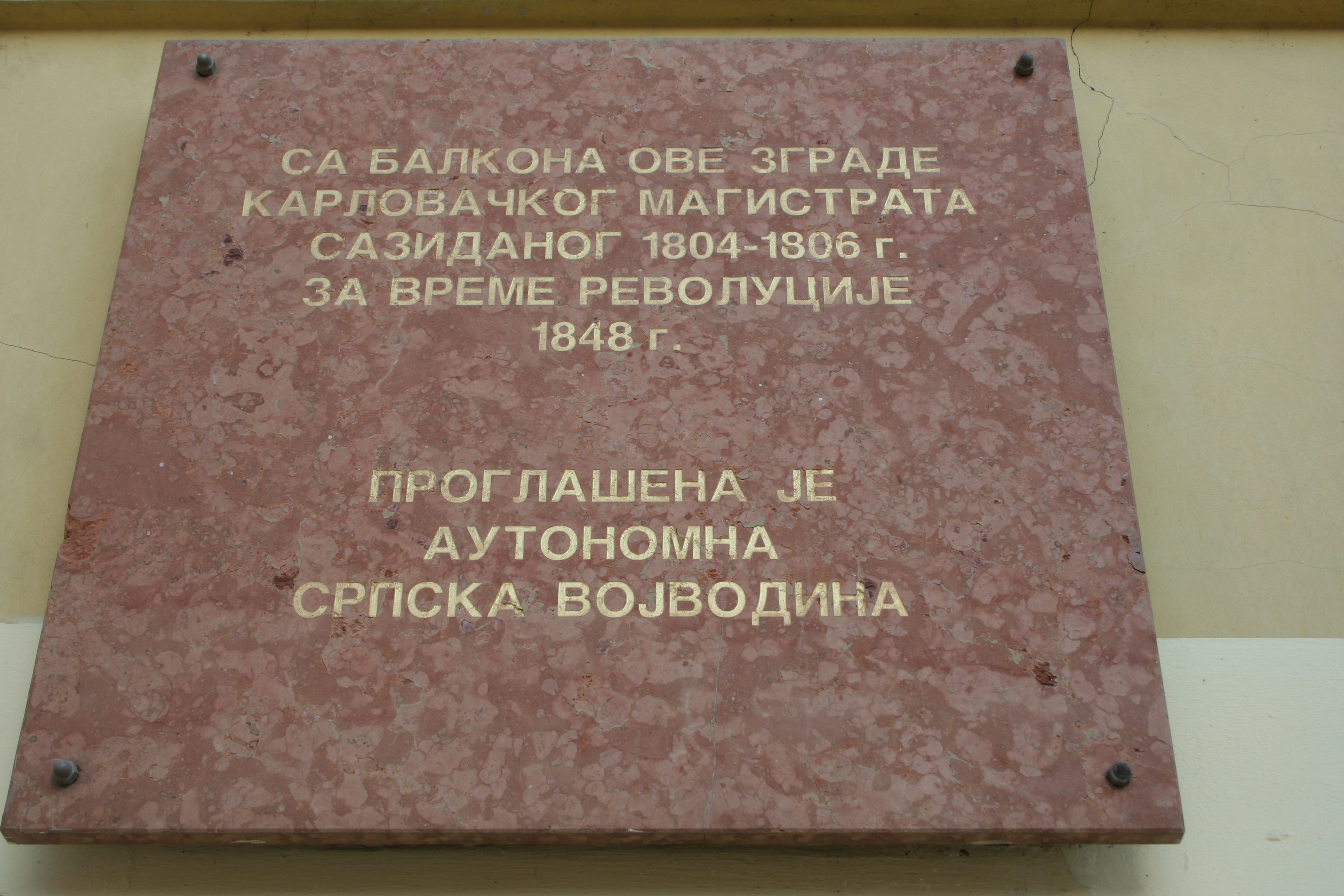 Magistrat - Gradska kuća